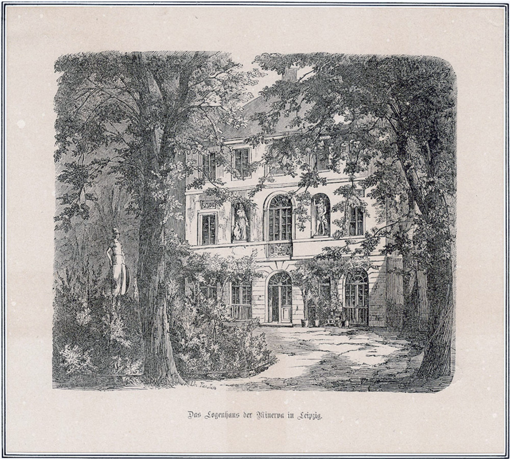 Das Logenhaus der Minerva zu den drei Palmen in Leipzig, Gartenseite, Holzstich um 1880